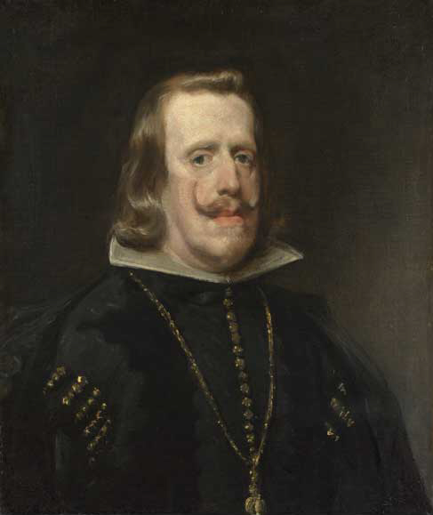 Felipe IV (1656)